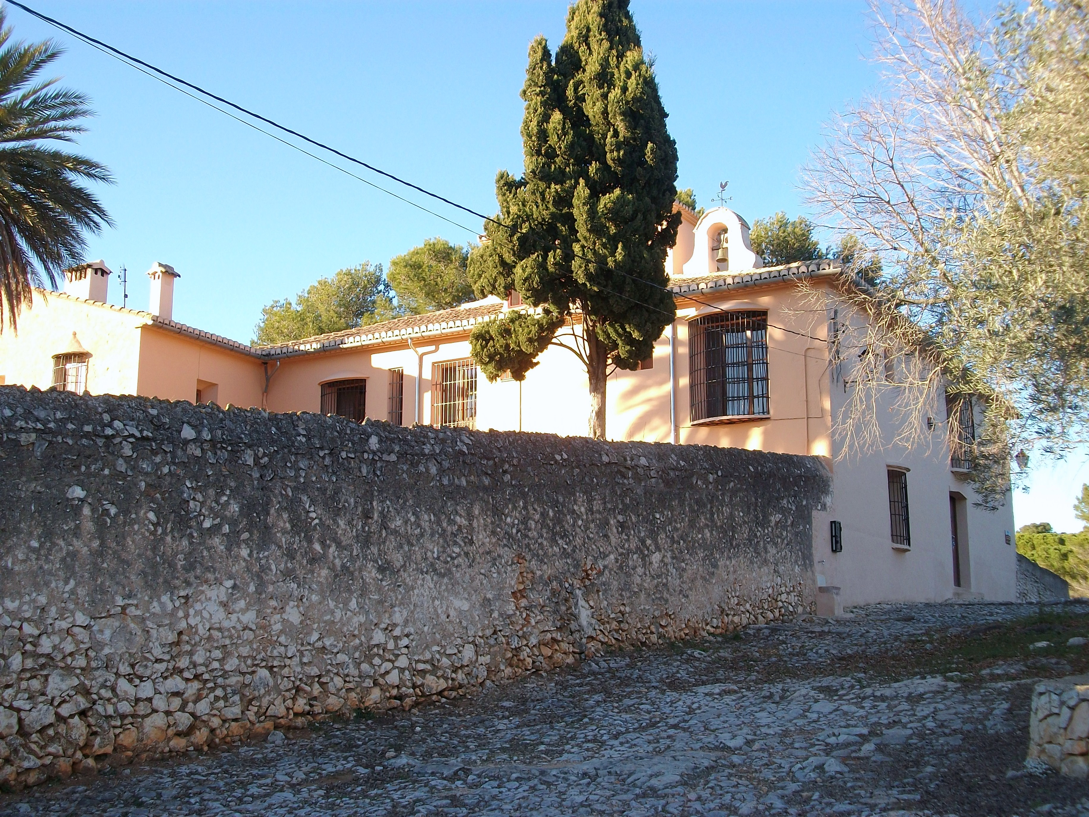 Ermita de la Mare de Déu de la Consolació de Llutxent.